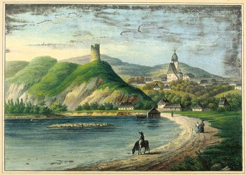 Czchów litografia wg rys. A. Gorczyńskiego, 1837-1838